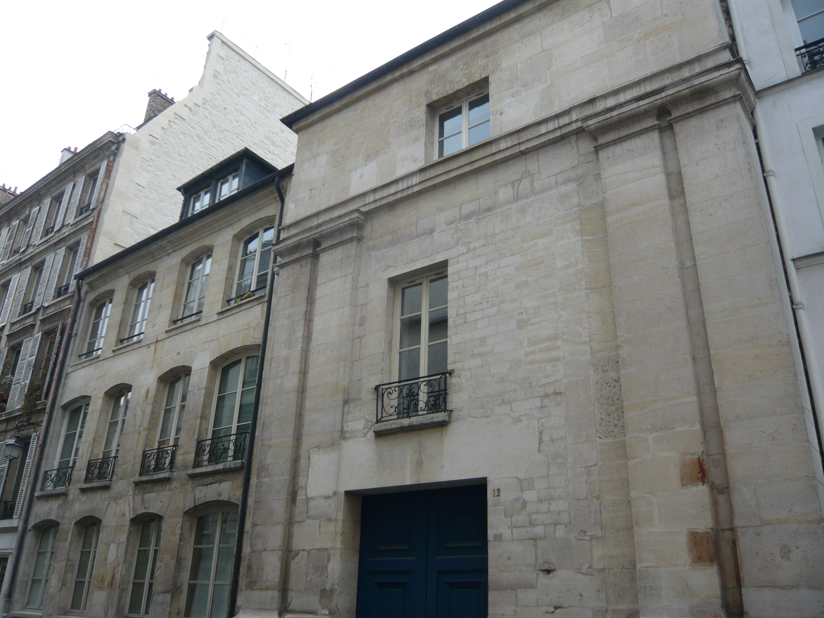 Facade 12 rue des Minimes